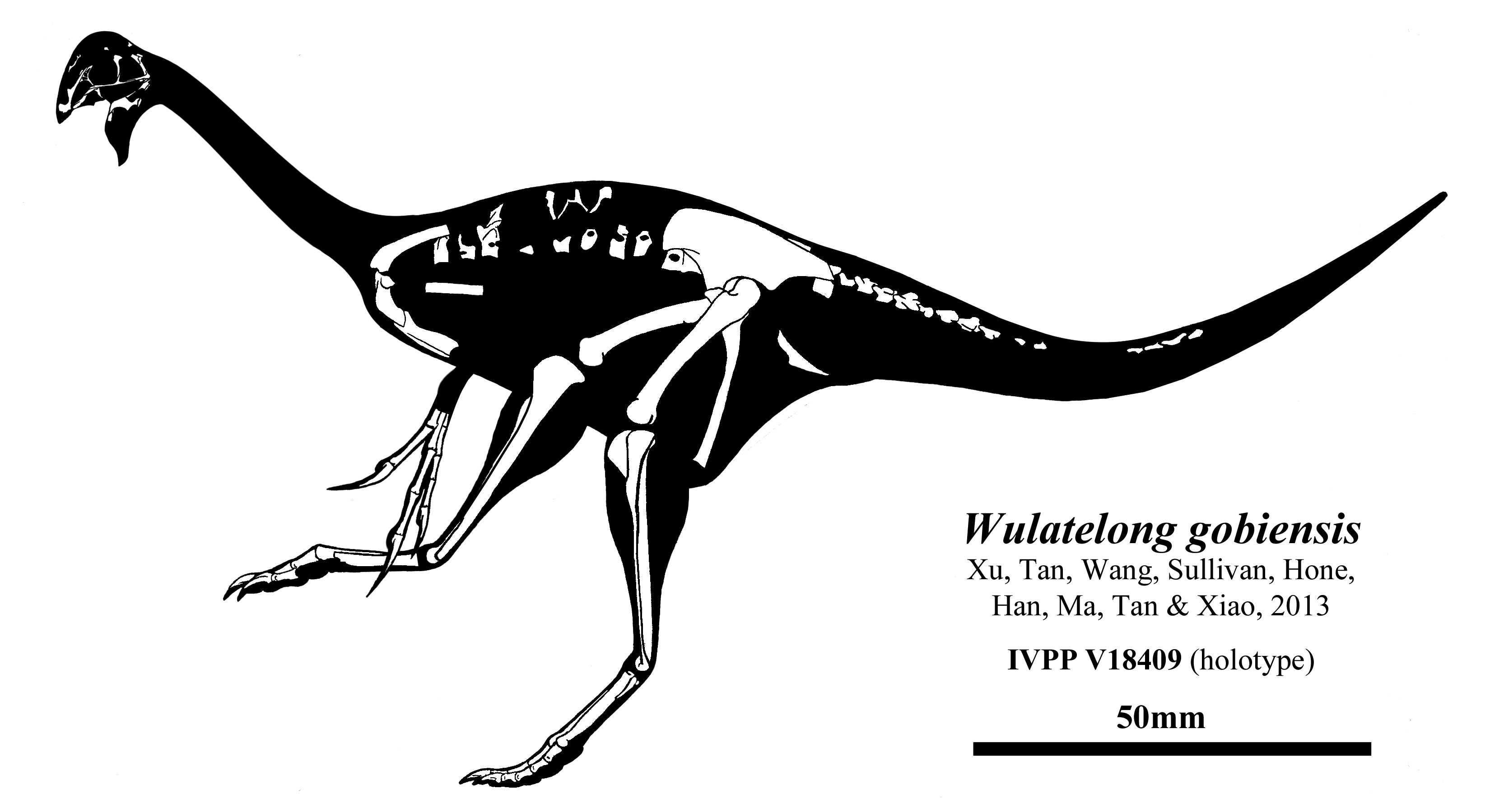 Wulatelong gobiensis.